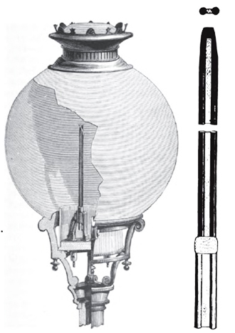 Vela Yablochkov